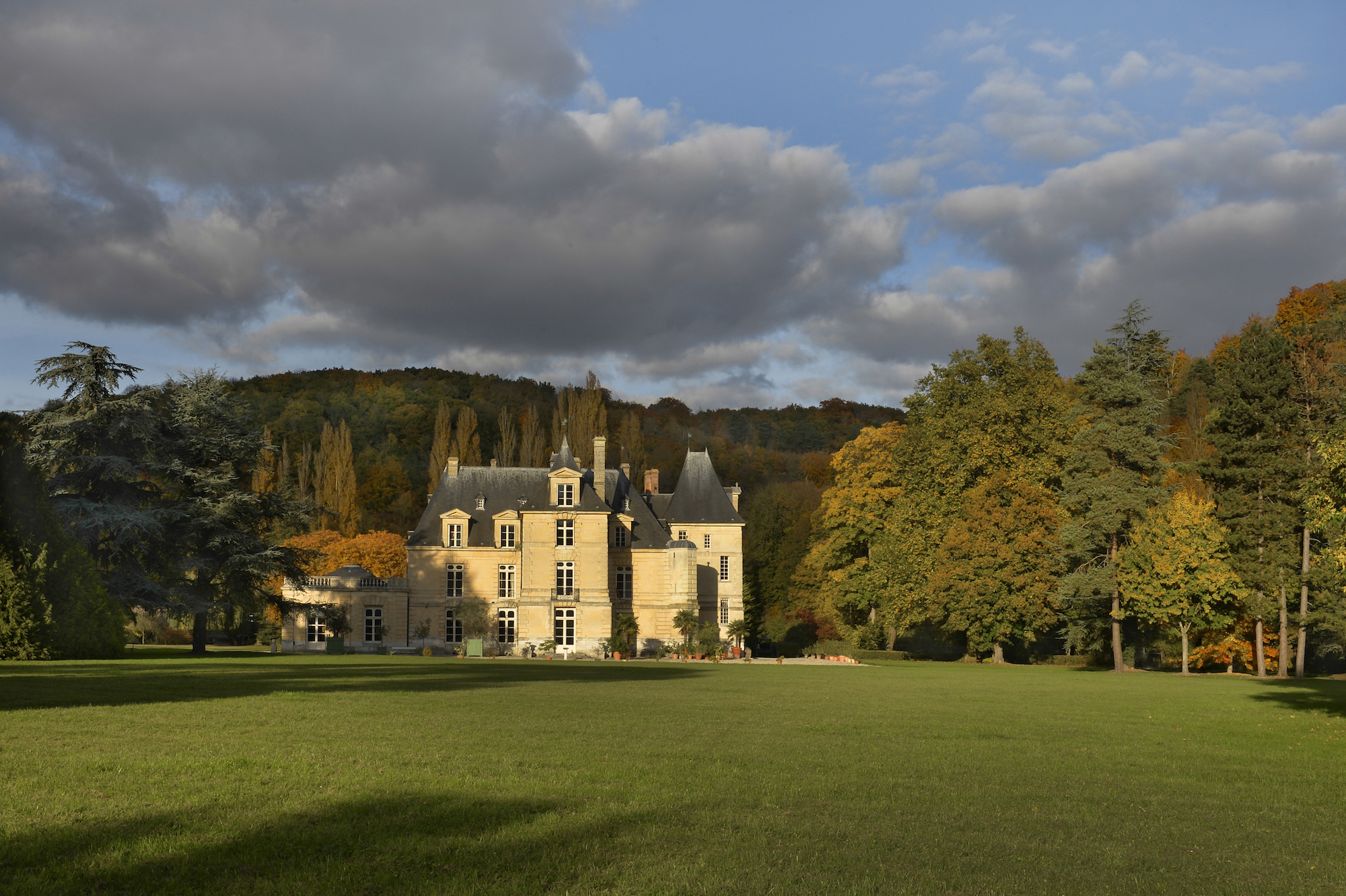 Un château renaissance à la mesure de l’homme